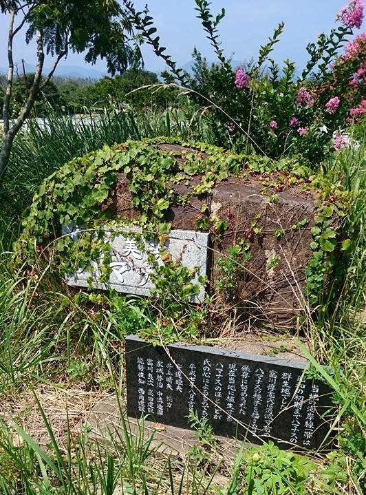 京丹後市箱石浜で一時絶滅が危惧されたハマナスの保護・復活に尽力した久美浜高校教諭・富川淳志の功績をたたえる記念碑。京丹後市久美浜町箱石の国道178号線沿いにある。